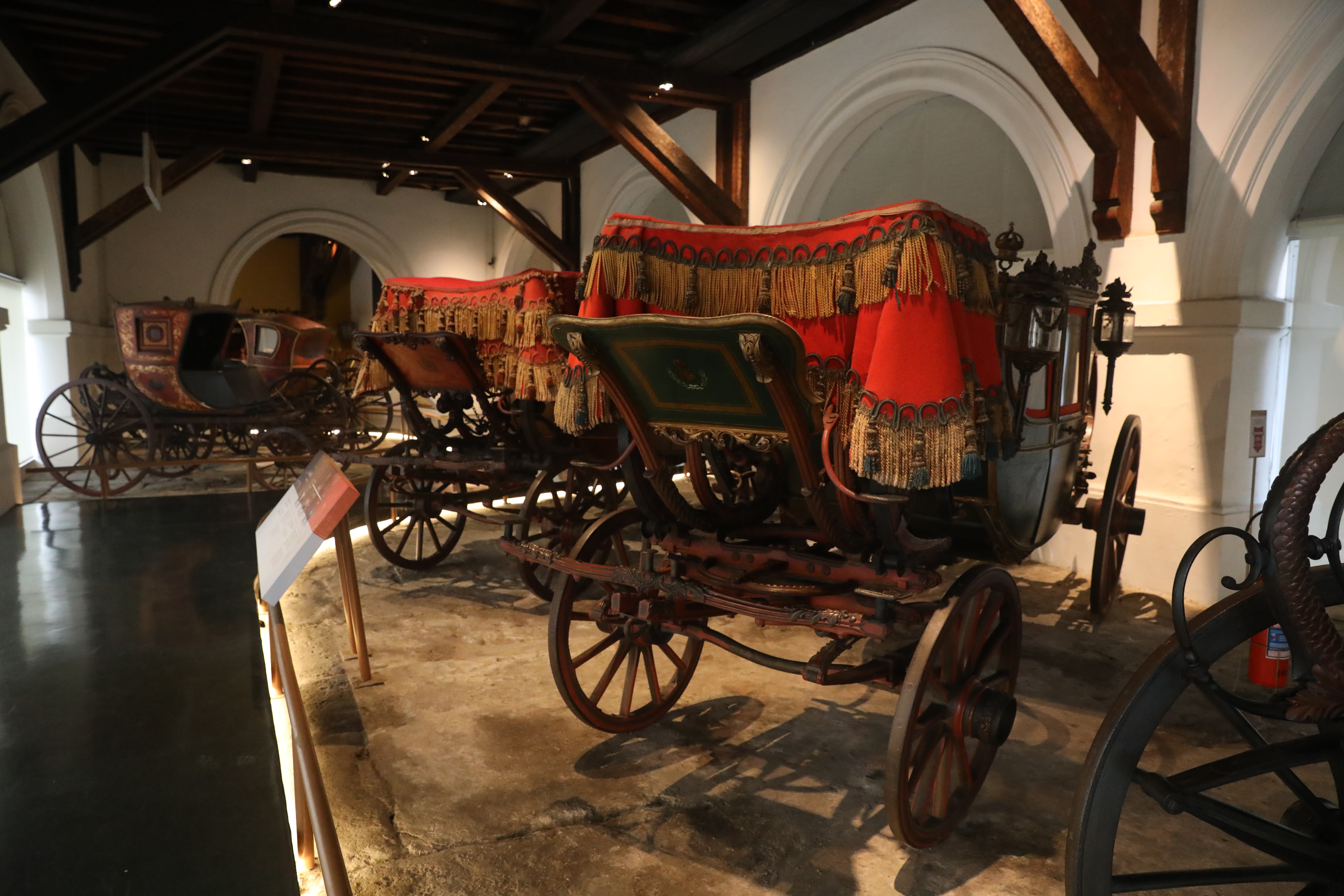 Carruagens do séc. XIX expostas no Museu Histórico Nacional, localizado na cidade do Rio de Janeiro (Brasil).